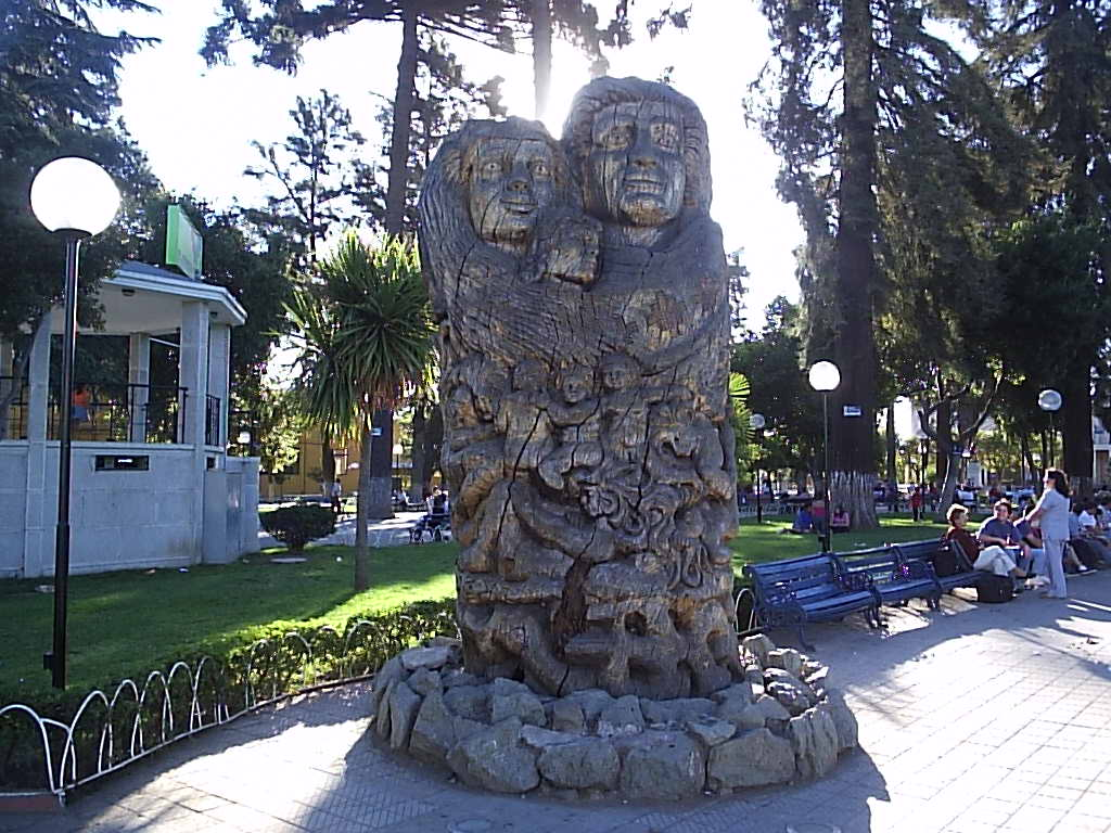 Plaza de Armas de Rengo Autor:Alstradiaan Fecha:Enero de 2005 Fotografía tomada con una cámara digital Olympus camedia D-395 de 3.2 megapixeles Categoría:Chile (imagen)